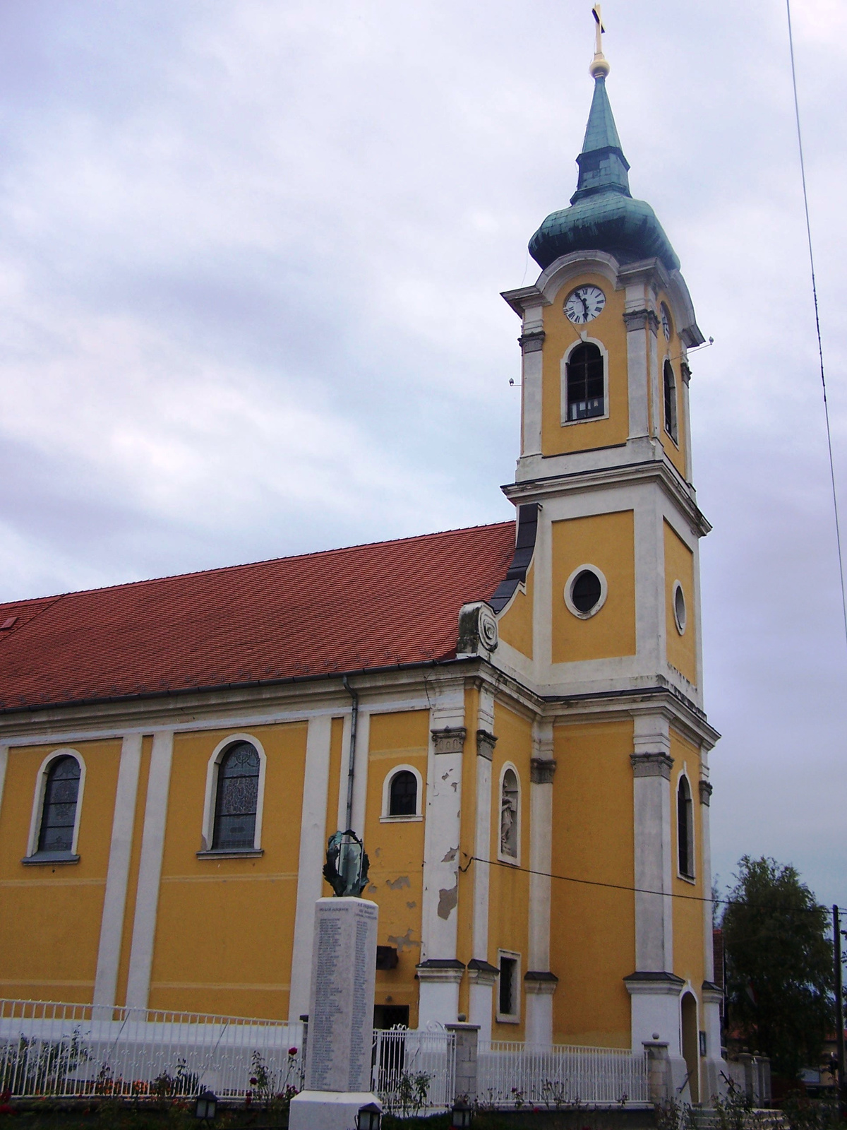 Keresztelő Szent János római katolikus templom (Üllő, Marx tér) This is a photo of a monument in Hungary, Identifier: 7477